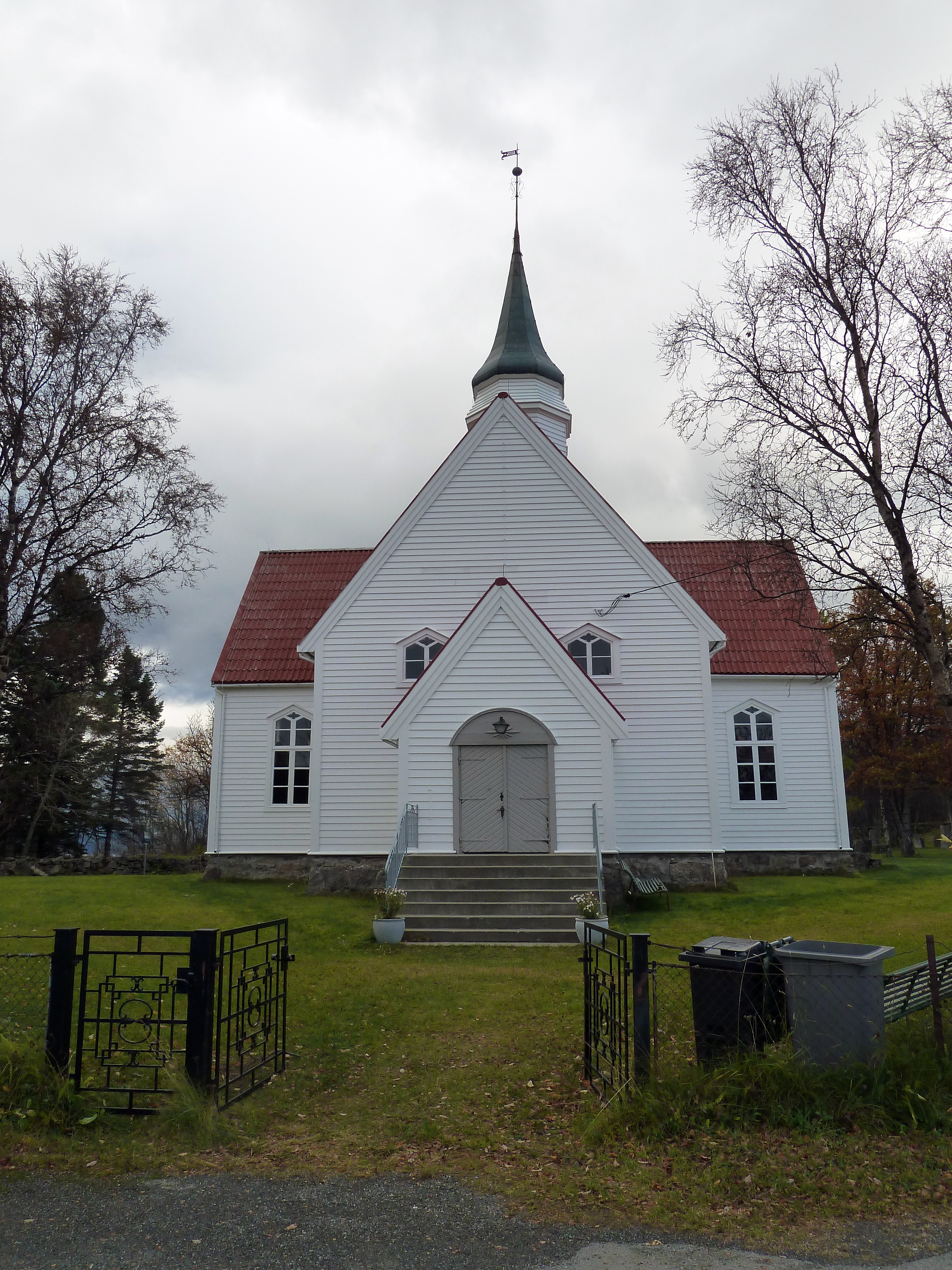 Bjarkøy kirke på Bjarkøya i Troms.